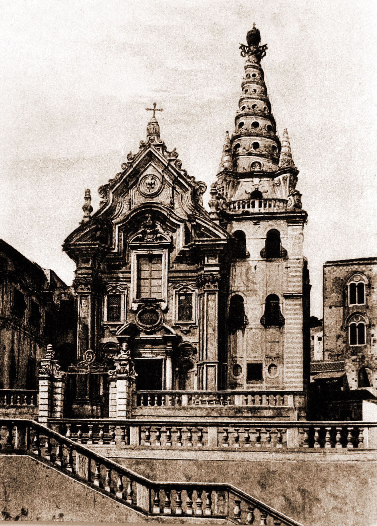 Chiesa di San Gregorio a Messina, progettata da Filippo Juvarra.